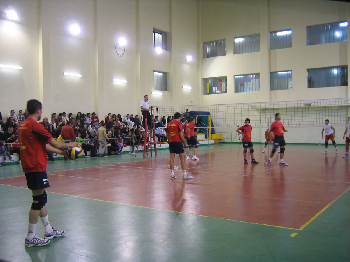 SilaSole San GIovanni in Fiore 2